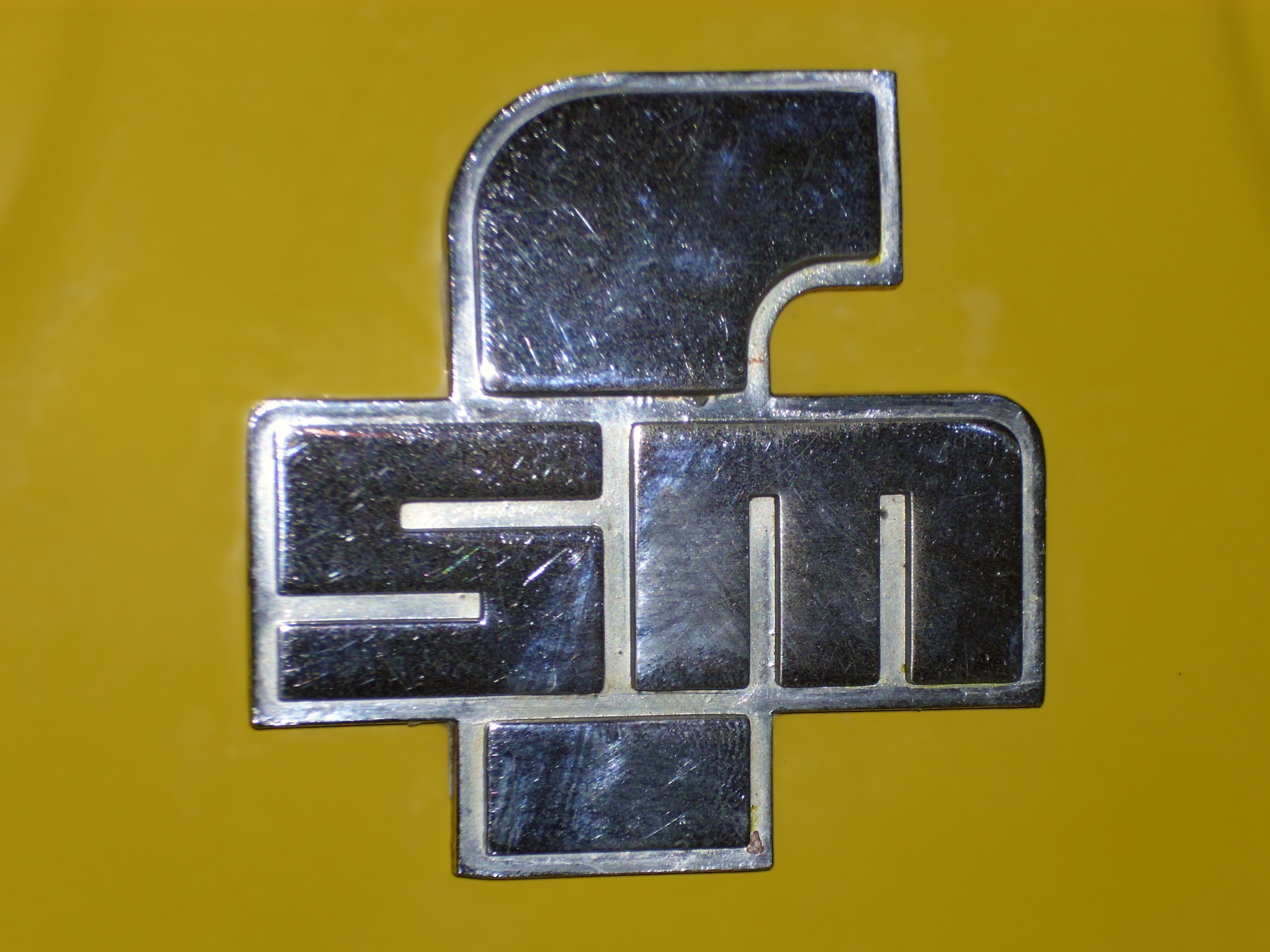 Emblem FSM an einem Syrena